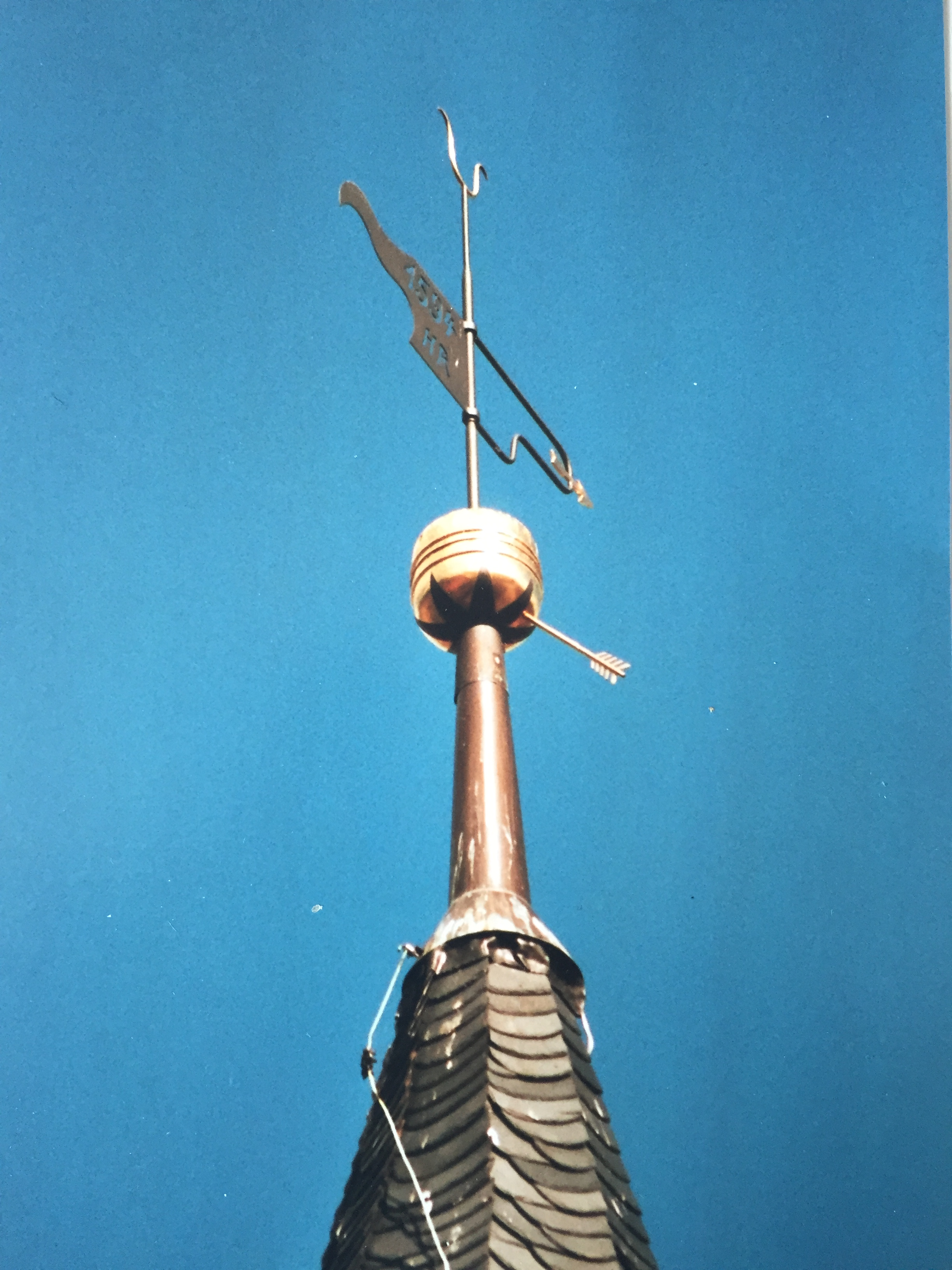 Башҡортса: Изге Лауренция сиркәүе көмбәҙендә башҡорт уғы, Щварц. Германия.